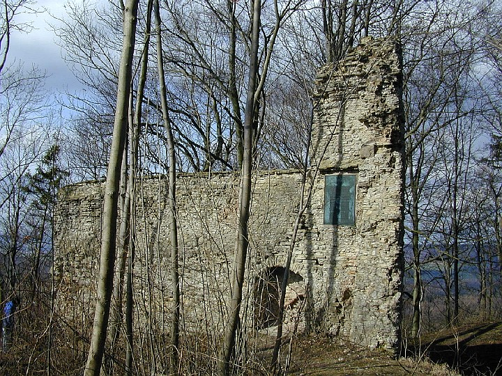 Burgruine auf dem Alten Gleichen (Landkreis Göttingen)